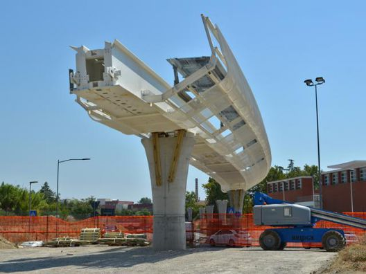 Cantiere del People Mover al Lazzaretto